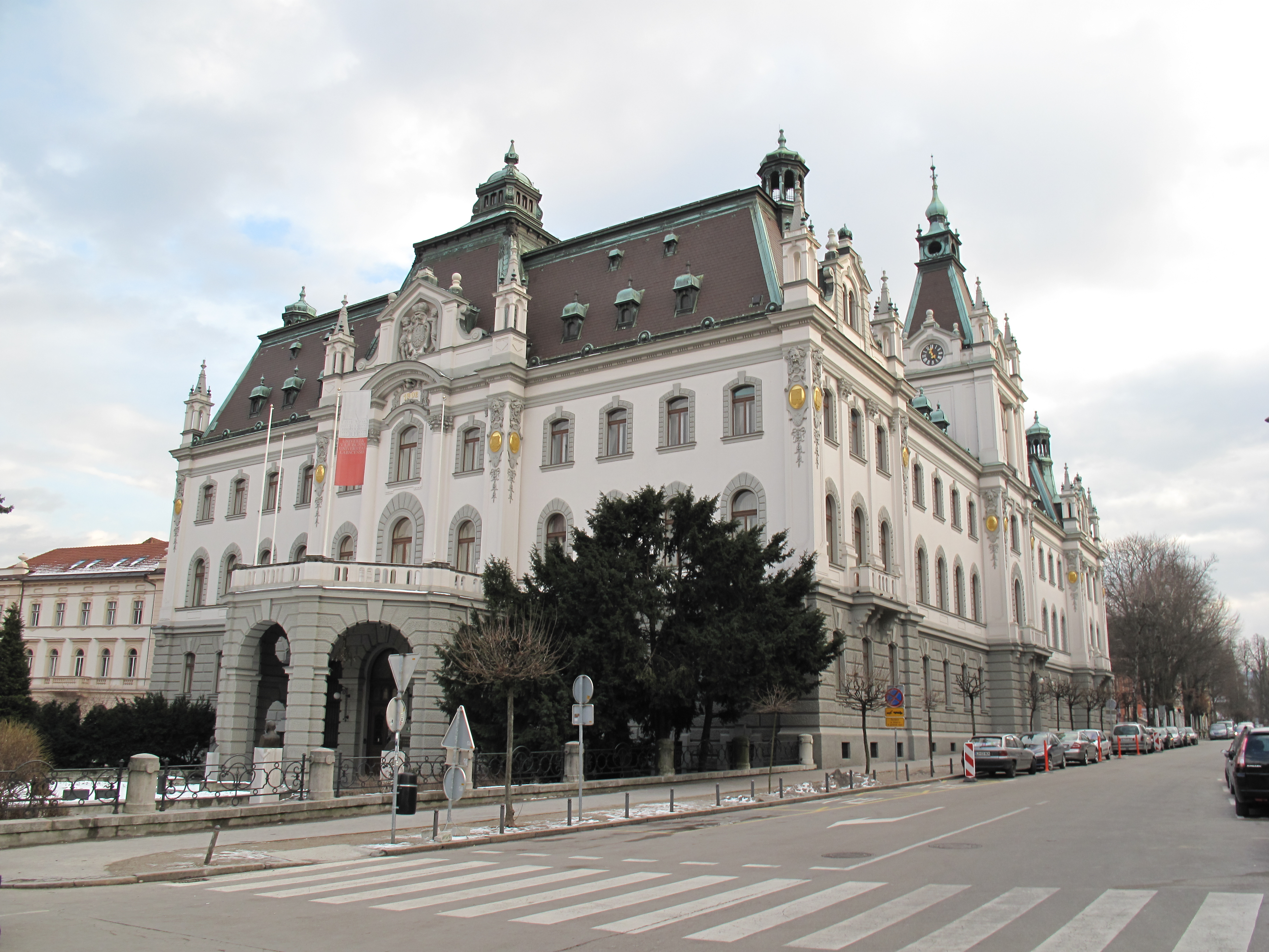 Deželni dvorec